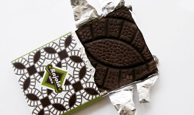 Rajola de xocolata que reprodueix el dibuix del Panot Súria. Manufacturat per la Fleca de la Font (Súria), el disseny gràfic és de Coaner Codina Pich.